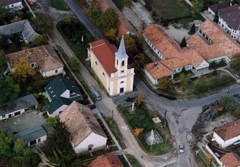 Kostel v obci Abda, Maďarsko.